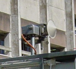 FPU（新潟テレビ２１ＳＮＧ中継車）